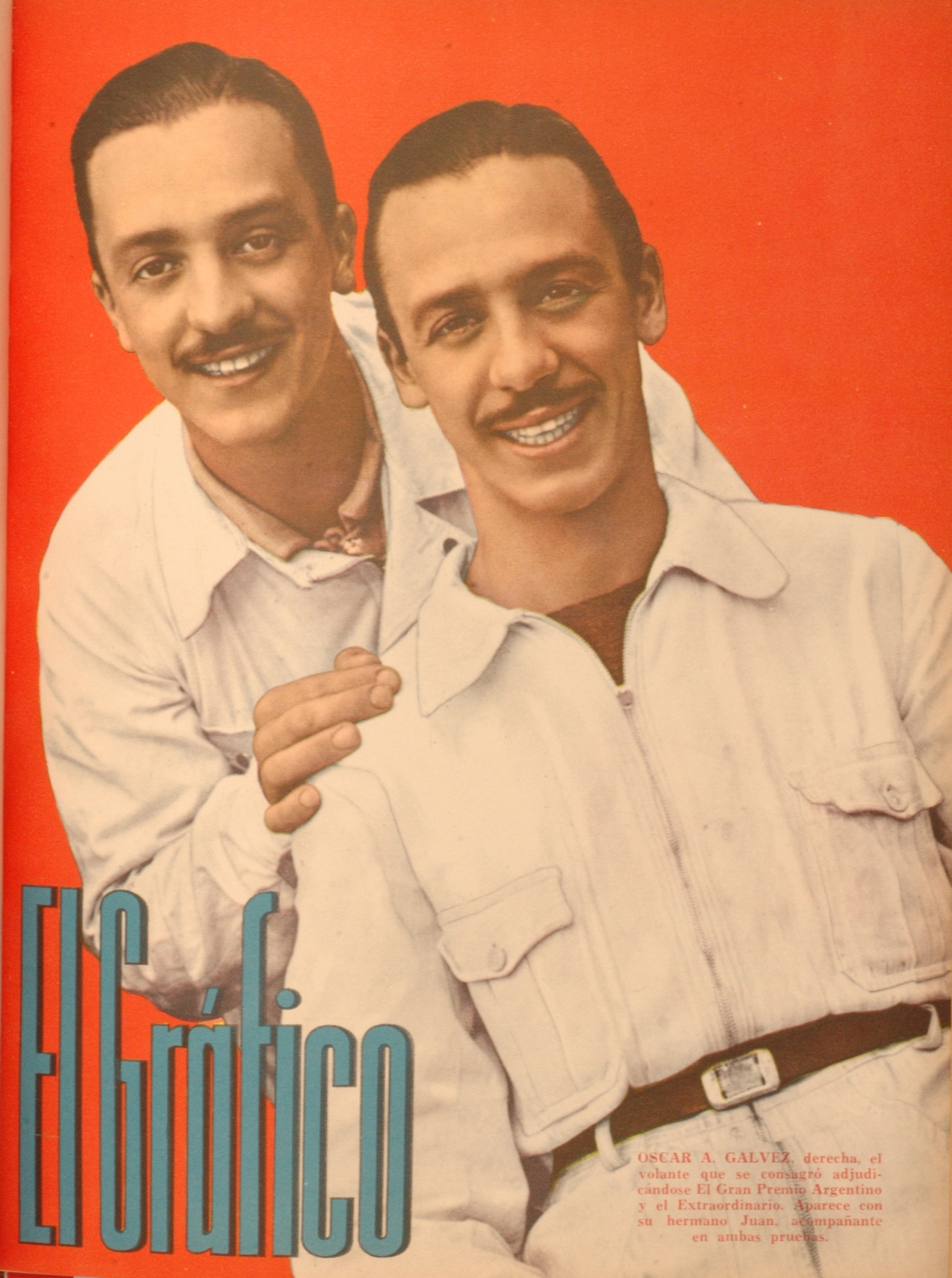 El Grafico del 17 de Noviembre de 1939. Edicion 1062